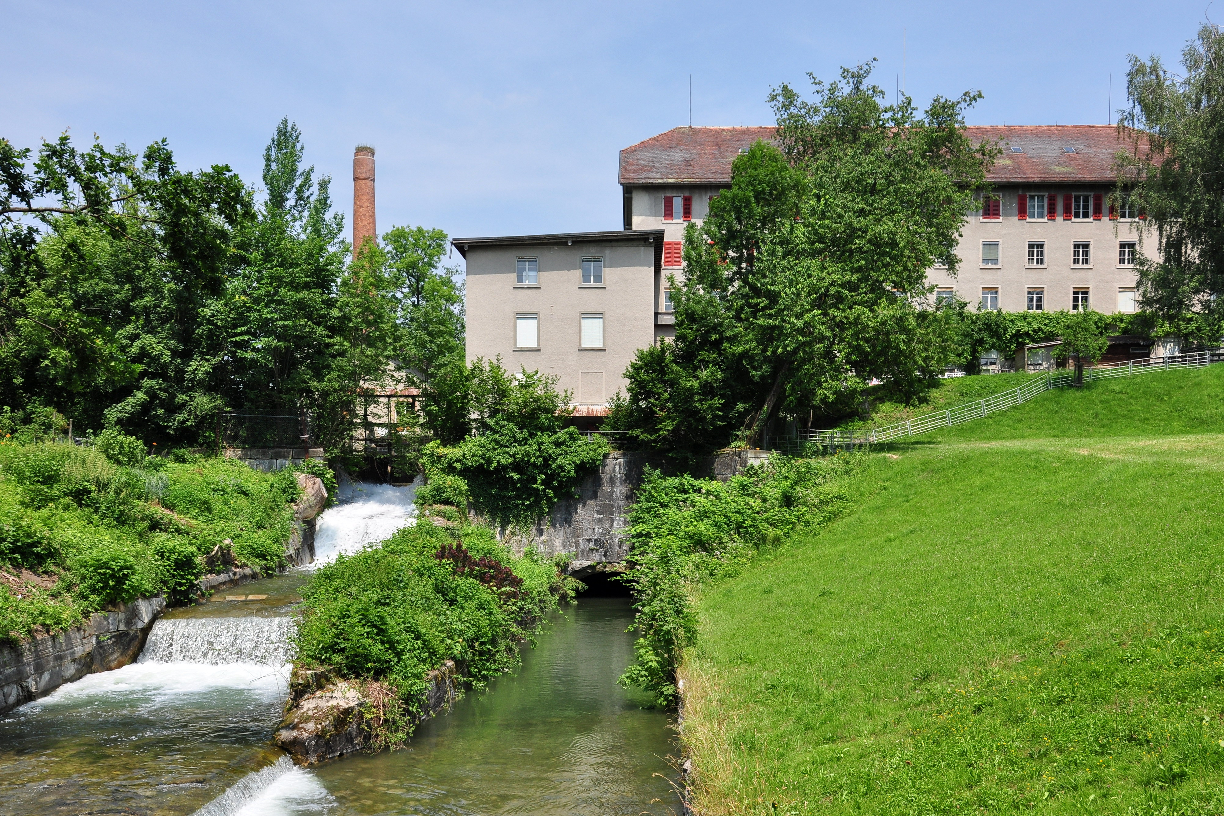 Ustermer Aa in Wetzikon (Switzerland)